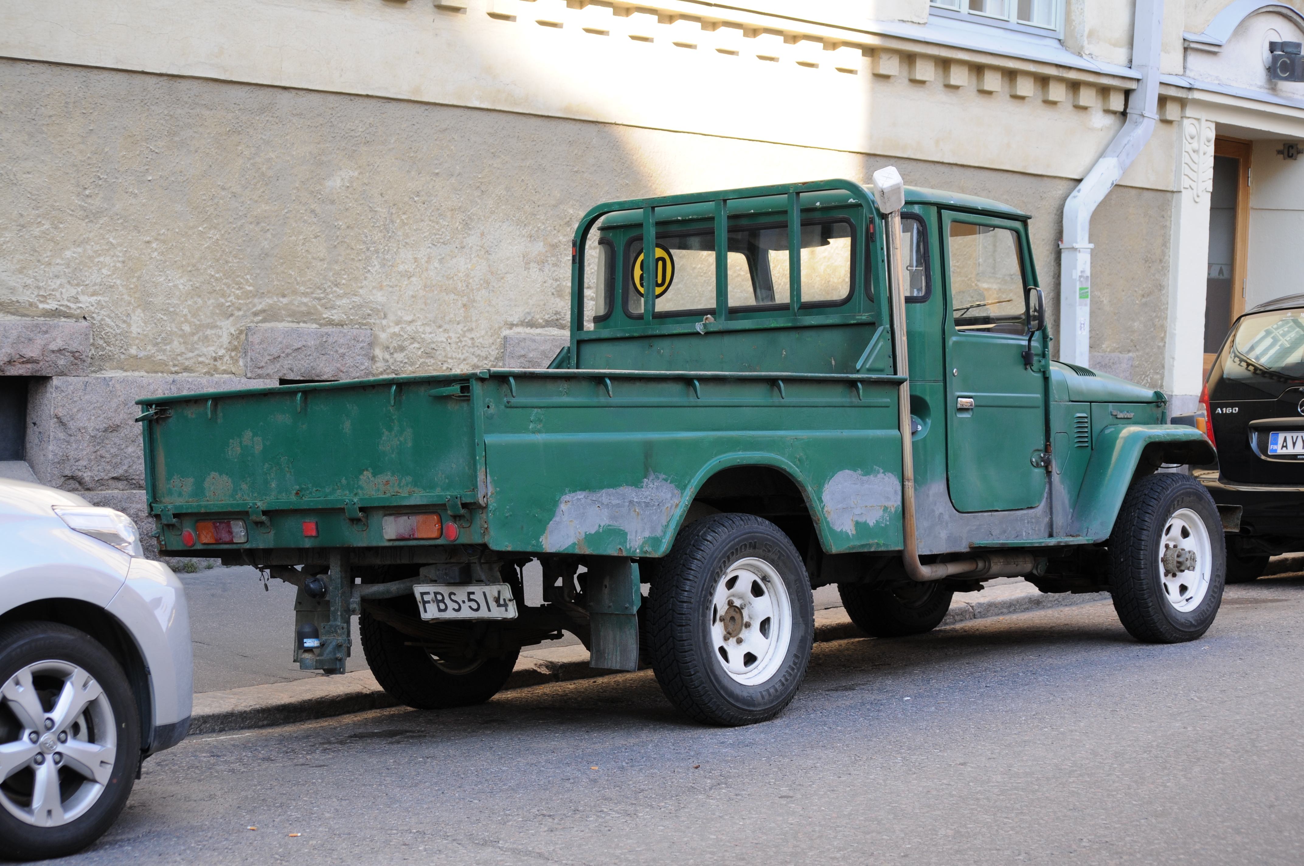 Helsinki